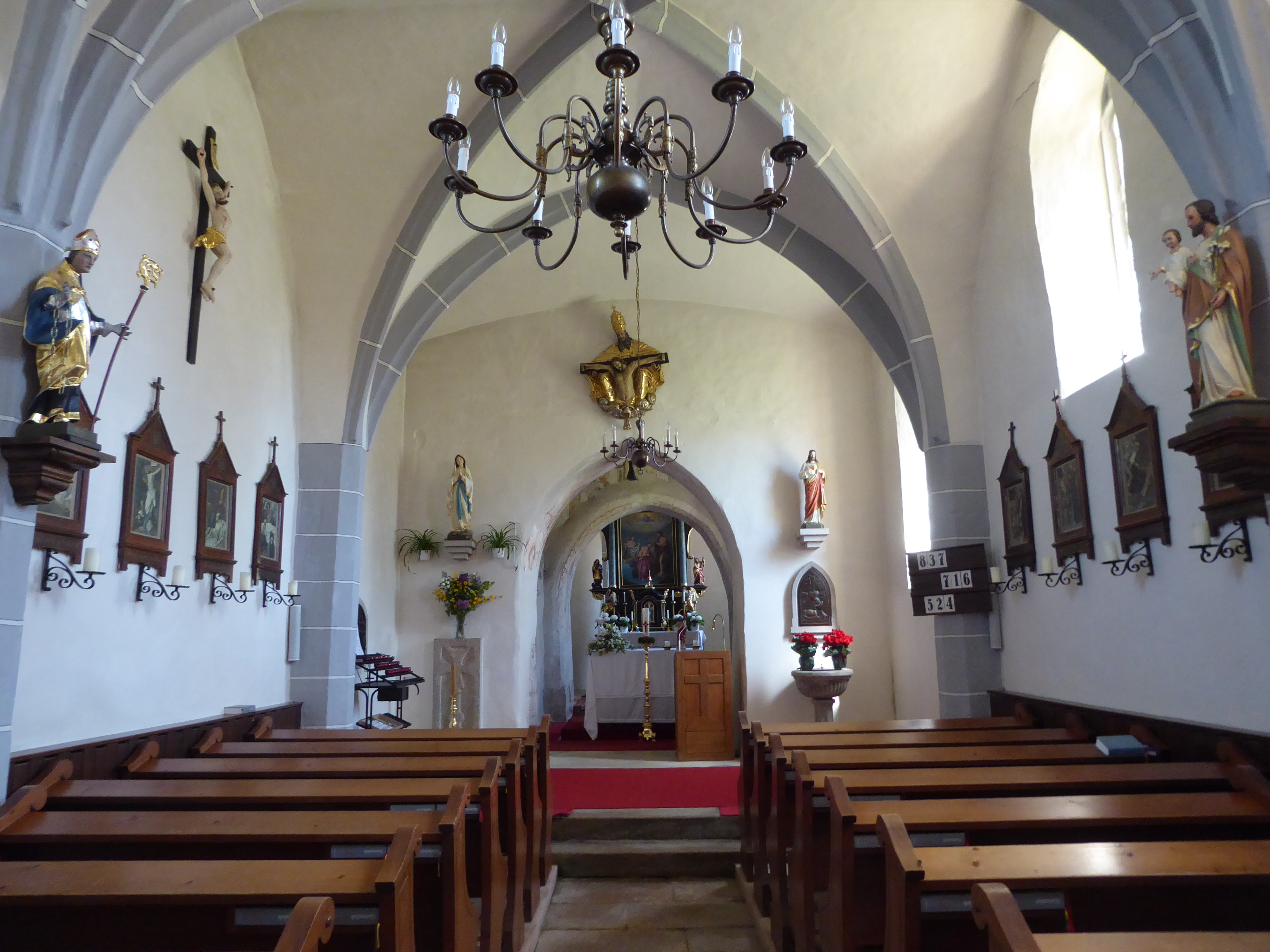 Pfarrkirche hl. Johannes der Täufer, Spital bei Weitra, Weitra, Niederösterreich - Innenansicht